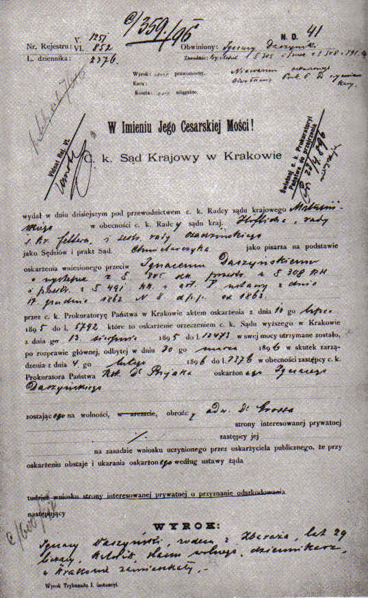 Sentence on Ignacy Daszyński (1866-1936).